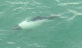 Description : Dauphin en Terre de Feu